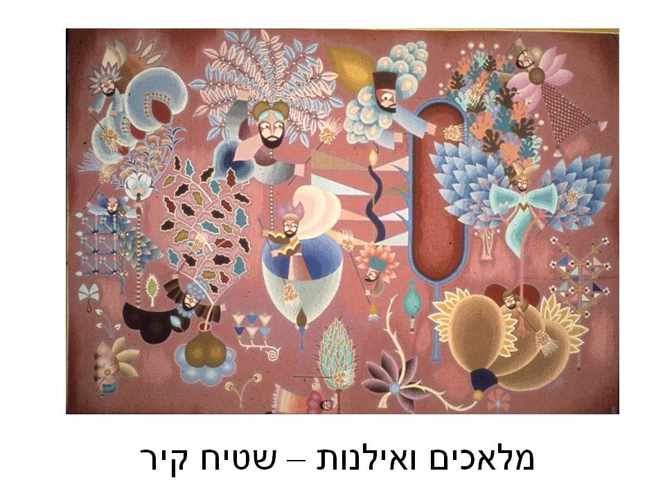 מלאכים ואילנות - שטיח קיר